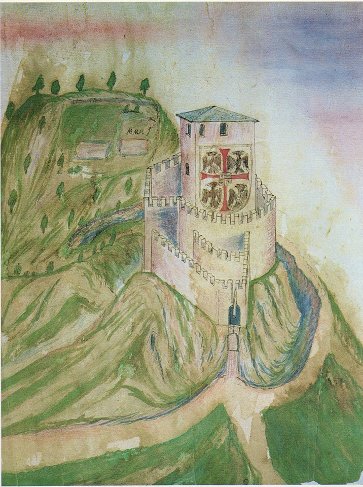 Disegno della torre di Solferino